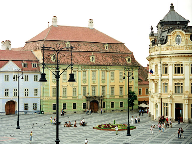 Gebäude am Großen Ring im Hermannstadt